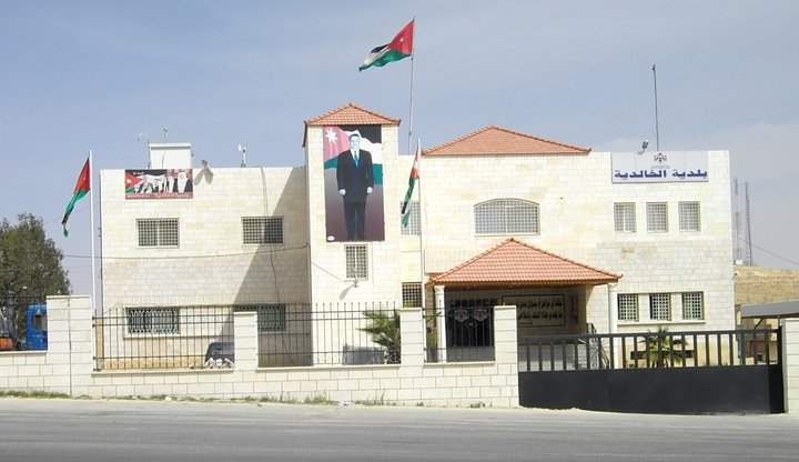 بلدية الخالدية محافظة المفرق